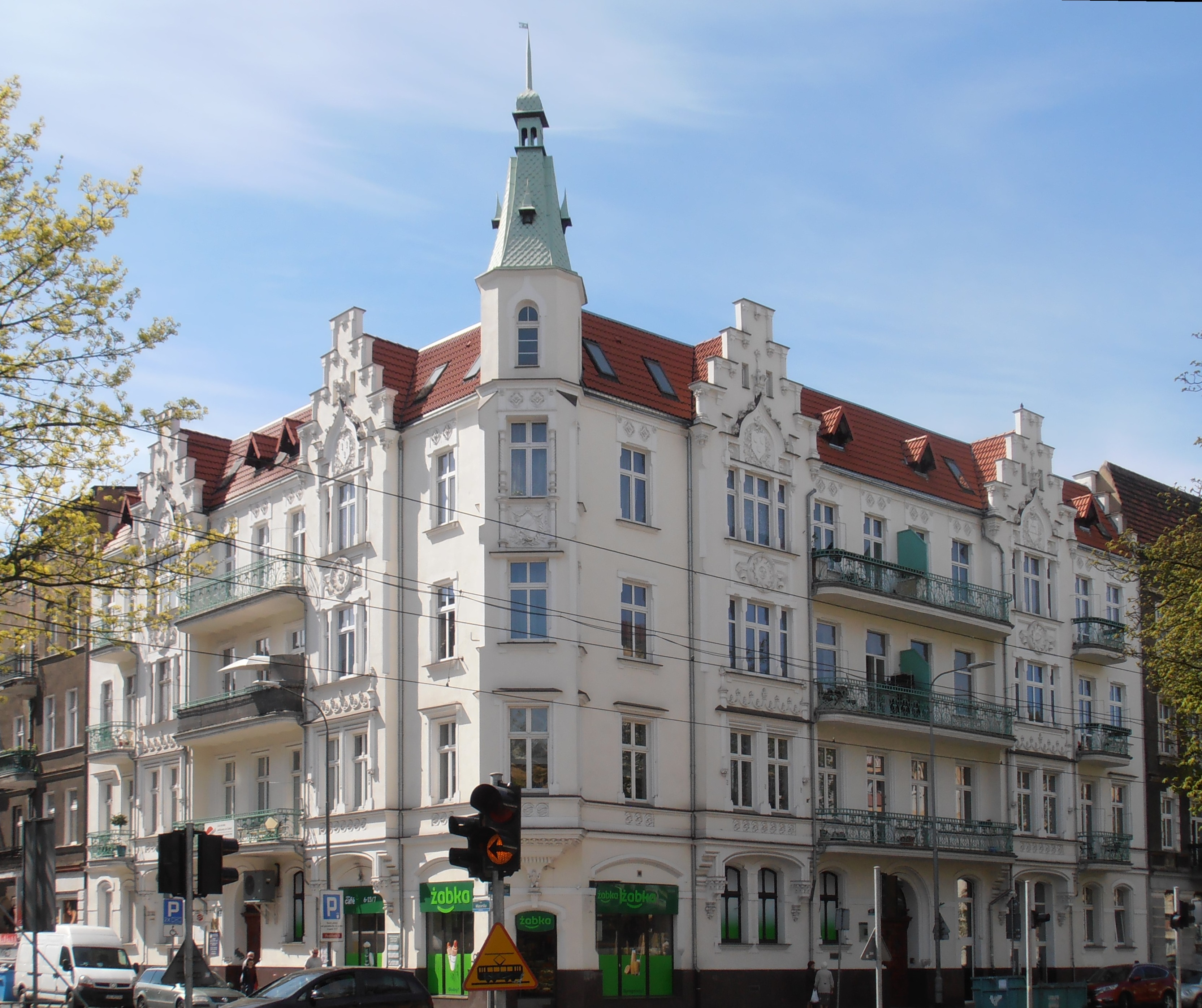 Zabytkowa kamienica przy ul. Piłsudskiego 37 w Szczecinie